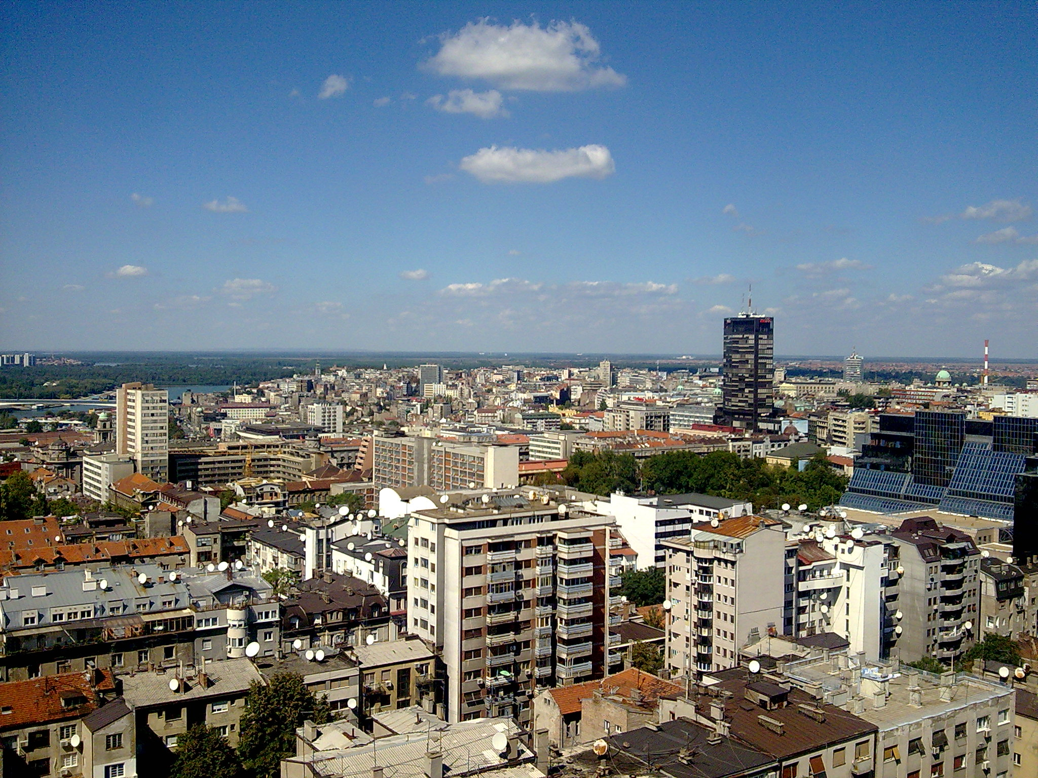 Pohled na střechy Bělehradu, hlavního města Srbska